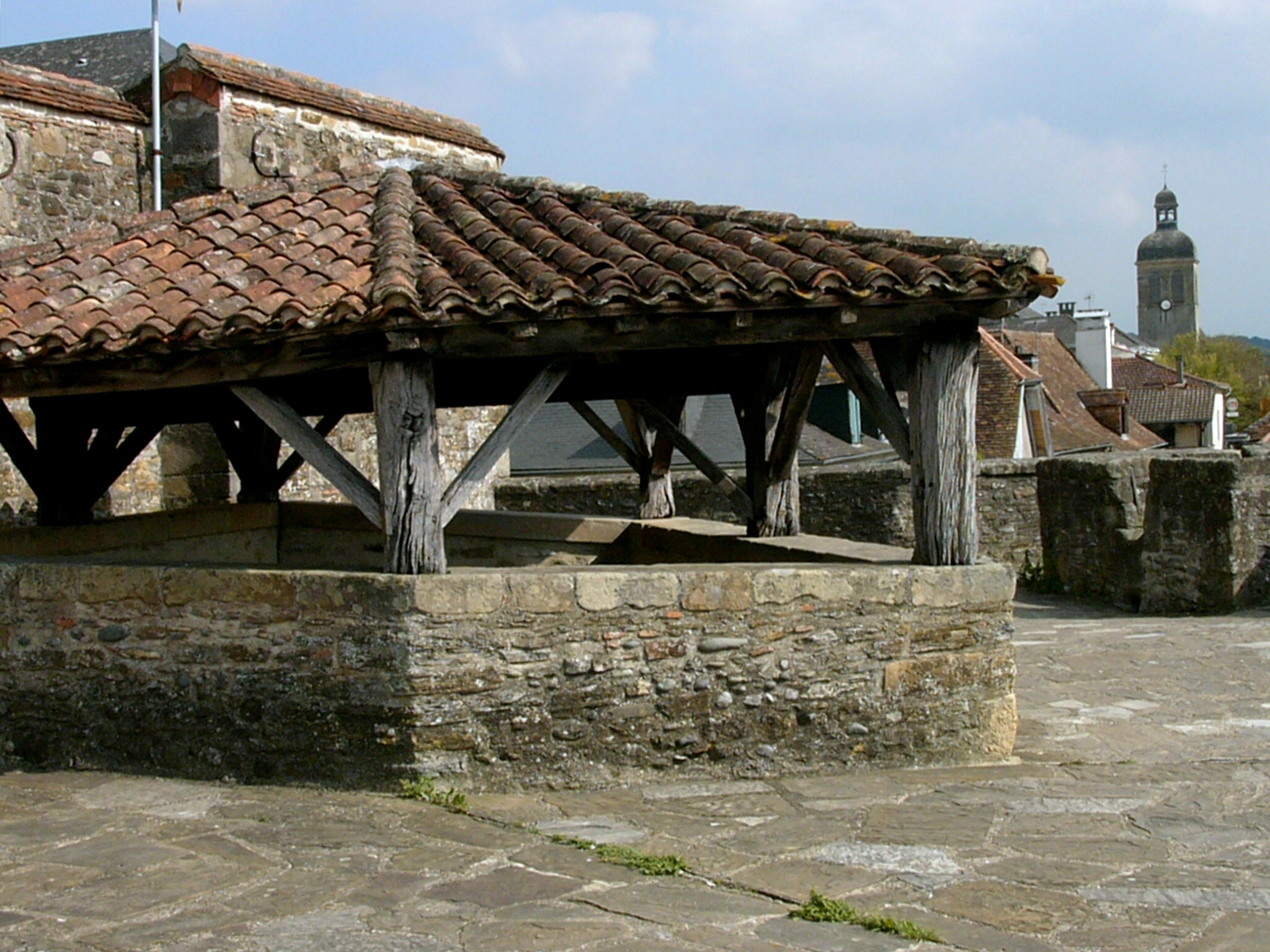 Puits de défense sur les remparts Navarrenx Pyrénées-Atlantiques France